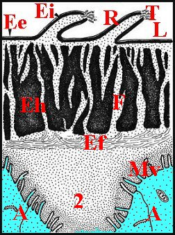 Schéma de la paroi du tube séminifère d' Hersilia savignyi au microscope électronique à transmission